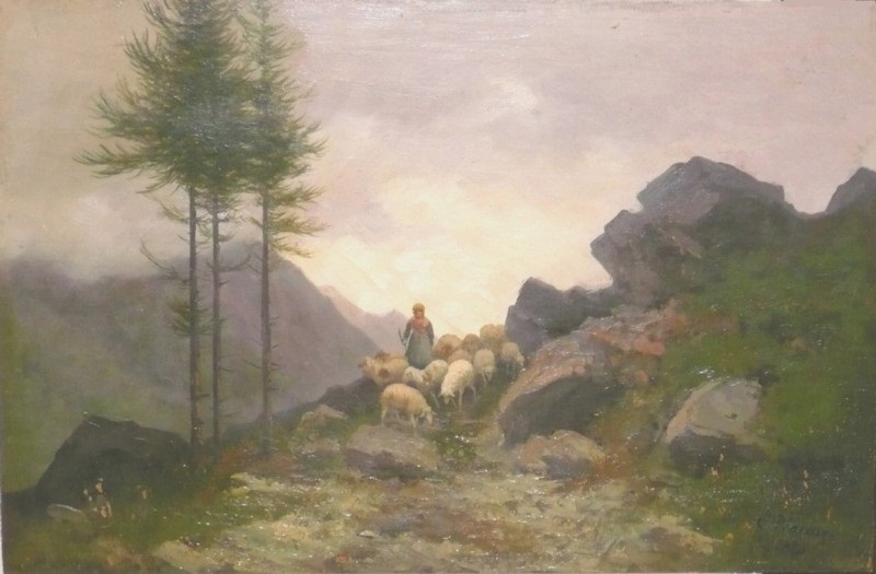 Ritorno dal pascolo, cm 32 x 48, olio su tavola, coll. privata